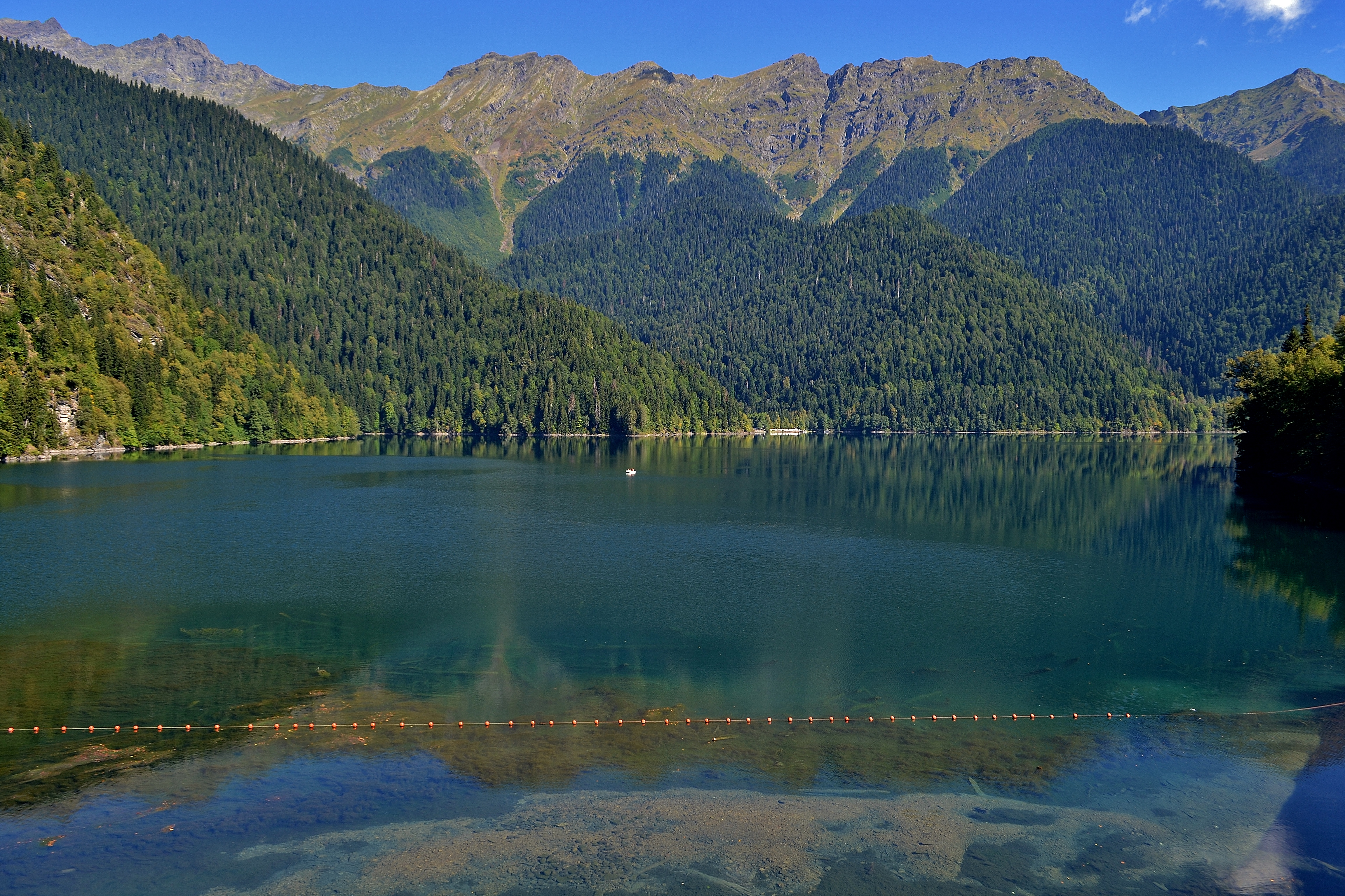 Рица. Вид от Охотничьего домика на север